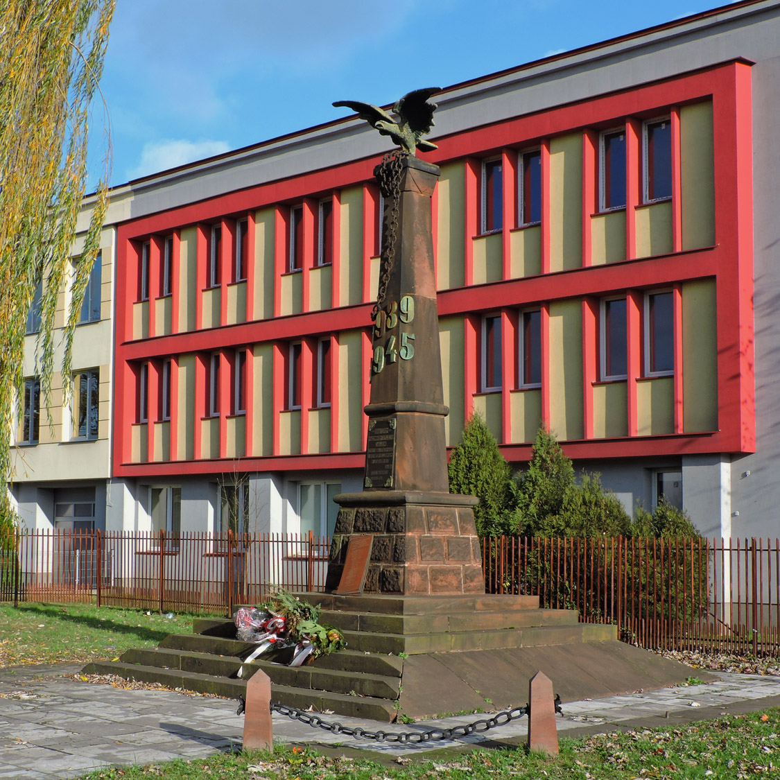 Radom, Miejsce Pamięci Narodowej, na terenie d. Fabryki Broni (2 pomniki ku czci zamordowanych w 1942 r. pracowników Fabryki Broni) (1958,1981)